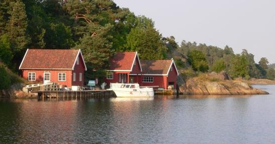 Strengereid brygge